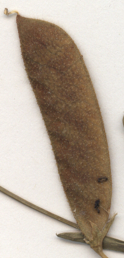 Lathyrus hirsutus, Schote, eigener Herbarbeleg